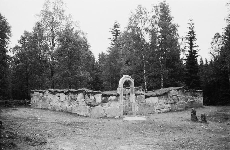 Kyrkoruinen från sydväst. Efter konservering. Kategori: (01) ExteriörerKyrkoruinen från sydväst. Efter konservering.